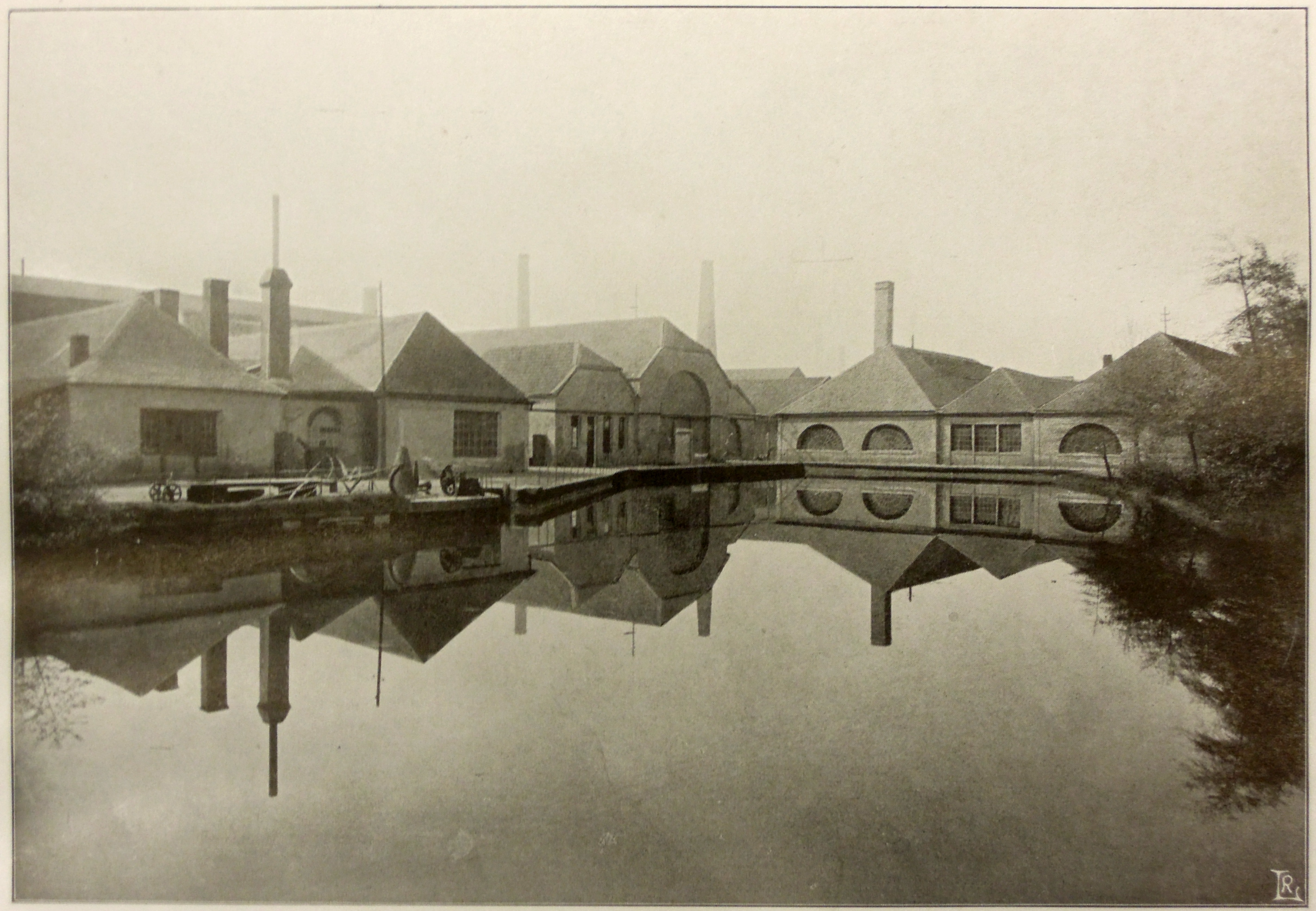 Hüttenweiher